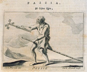 Iconologia (1764) (Pazzia)